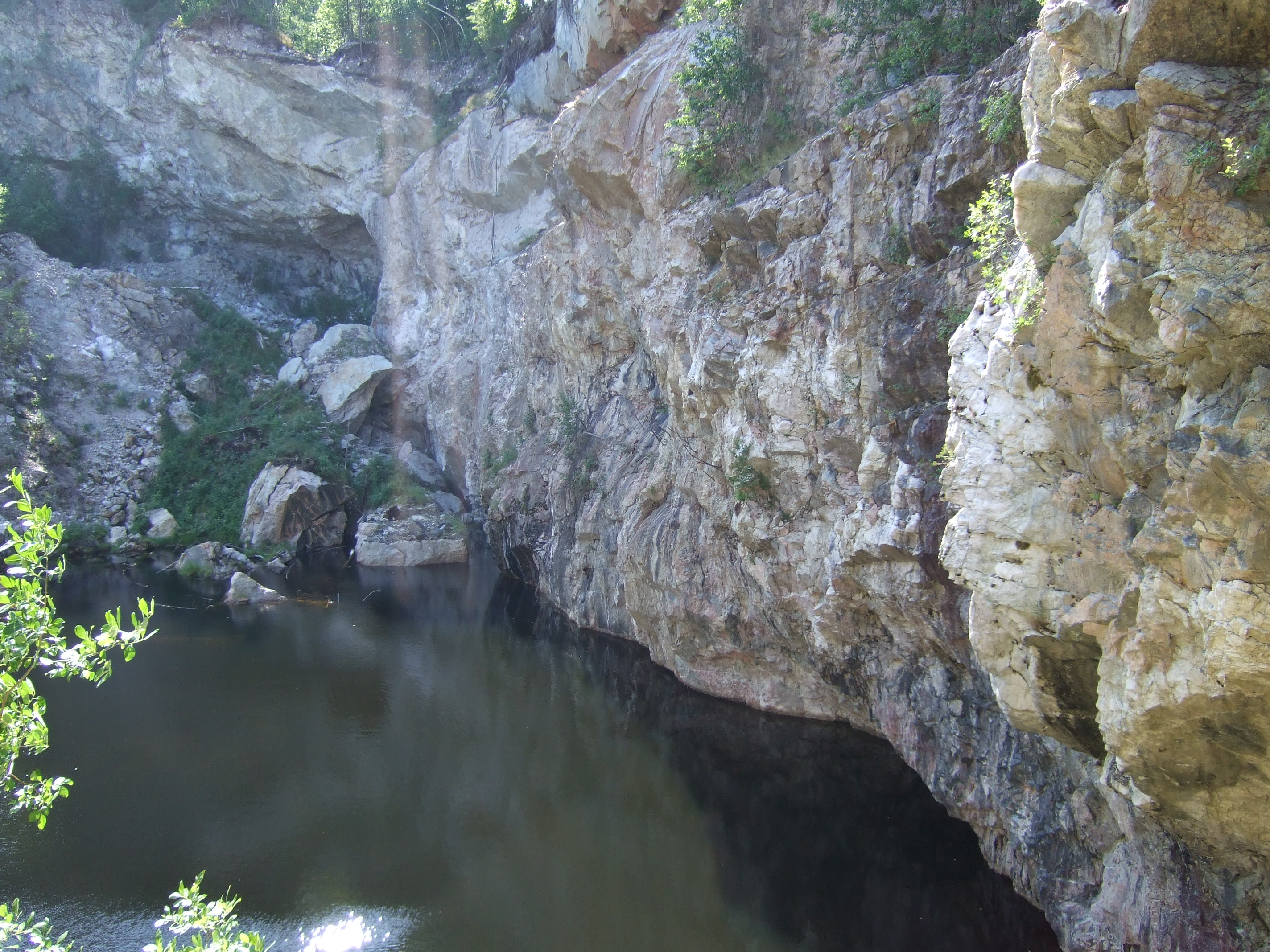 Gloserhei Quartz & Feldspar mine, Norway.